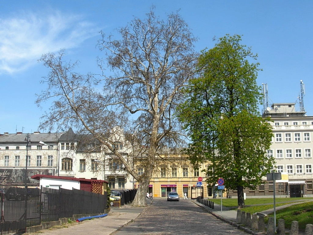 Platan pomnik przyrody na placu Teatralnym w Bydgoszczy